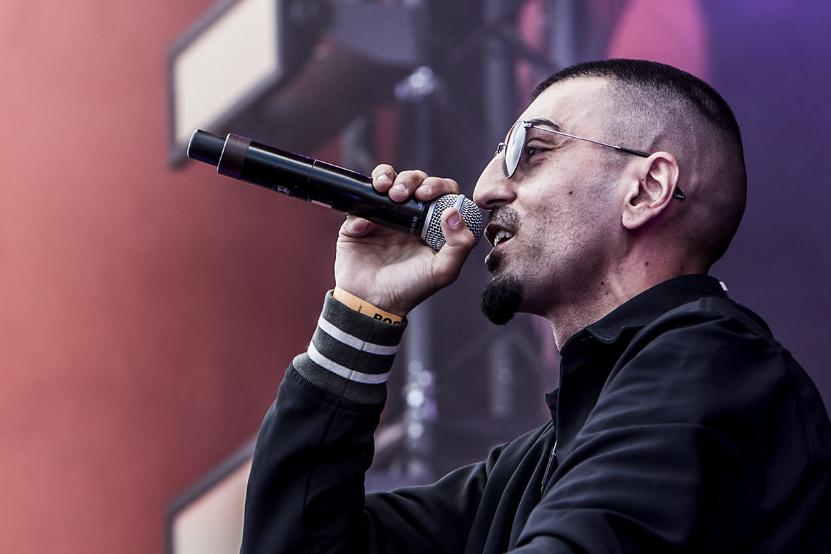 Rapperen S!vas på Roskilde Festival 2014